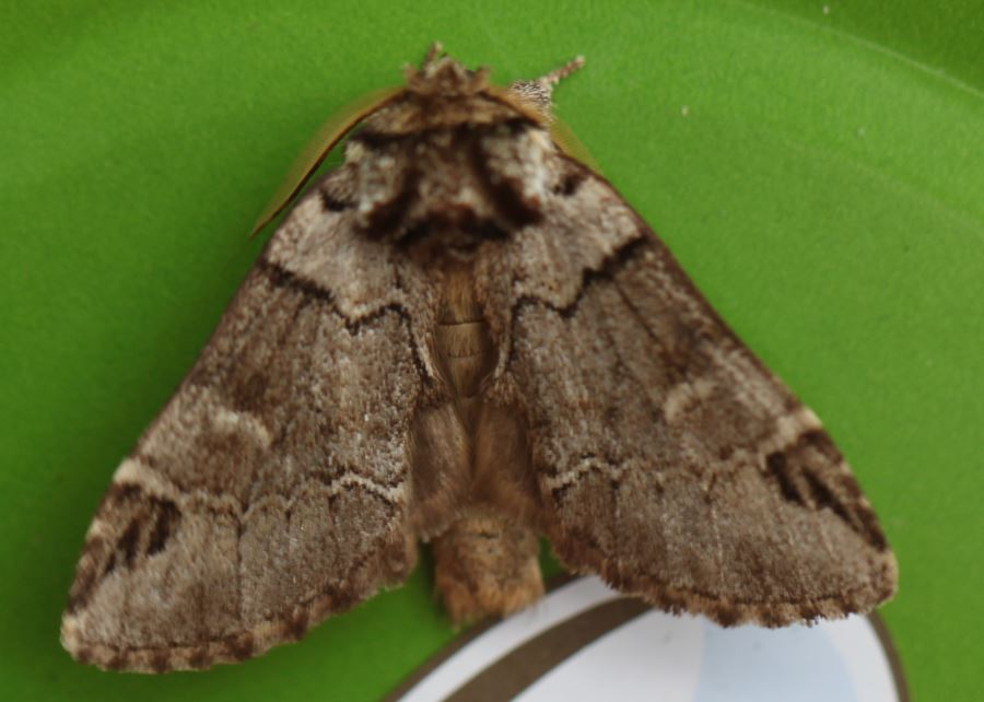 Schwarzeck-Zahnspinner (Drymonia obliterata) am 24.7.2017 in Walldorf/Baden